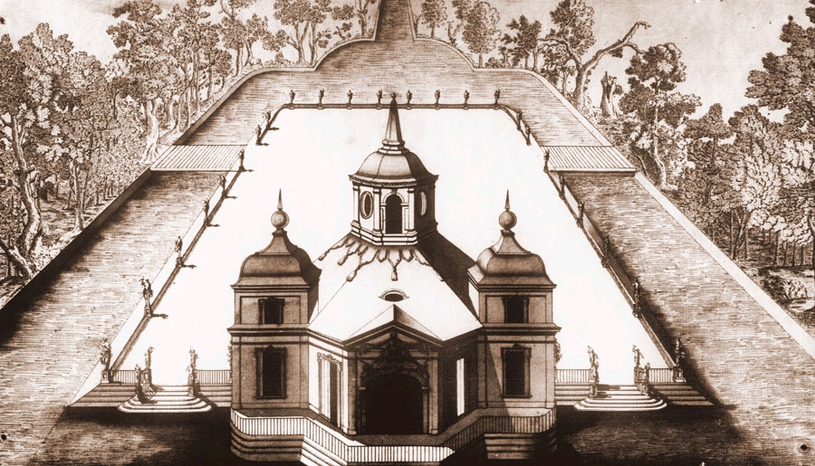 Stanisław Herakliusz Lubomirski bathing pavilion in Warsaw.